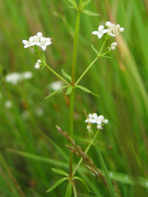 Sumpf-Labkraut Galium palustre, Zingst